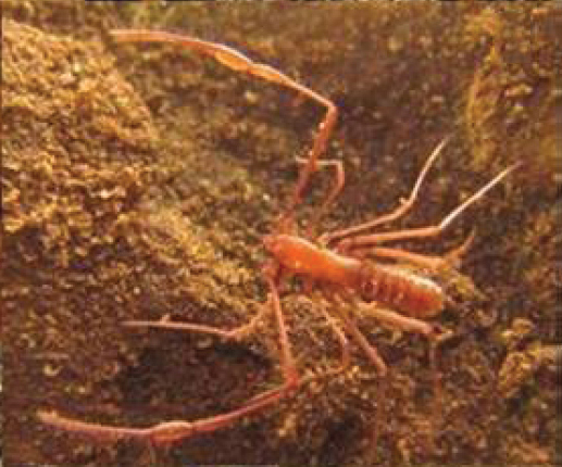 Figure 2; Spelaeobochica muchmorei